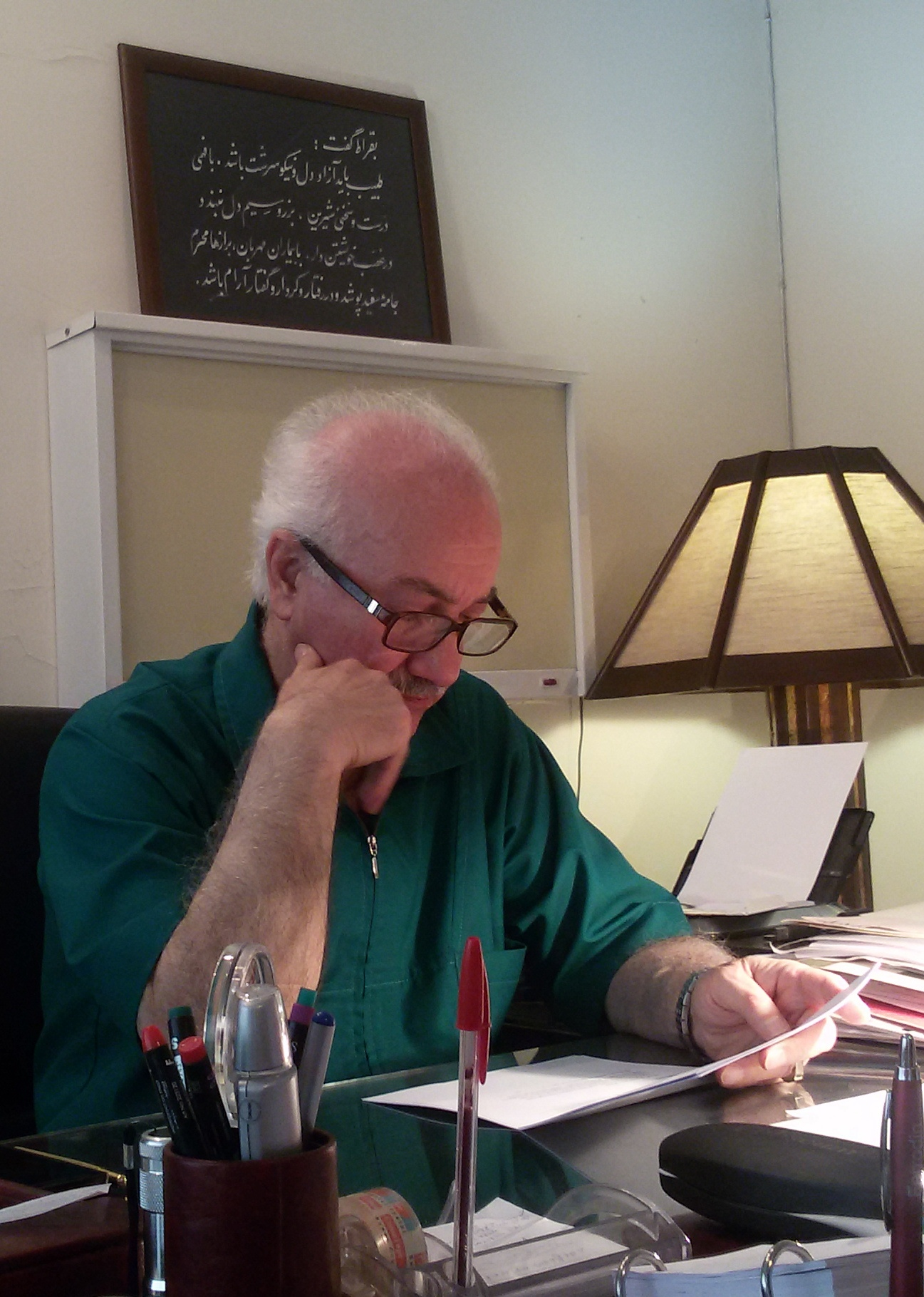 سید حسین موسویان (جبهه ملی)